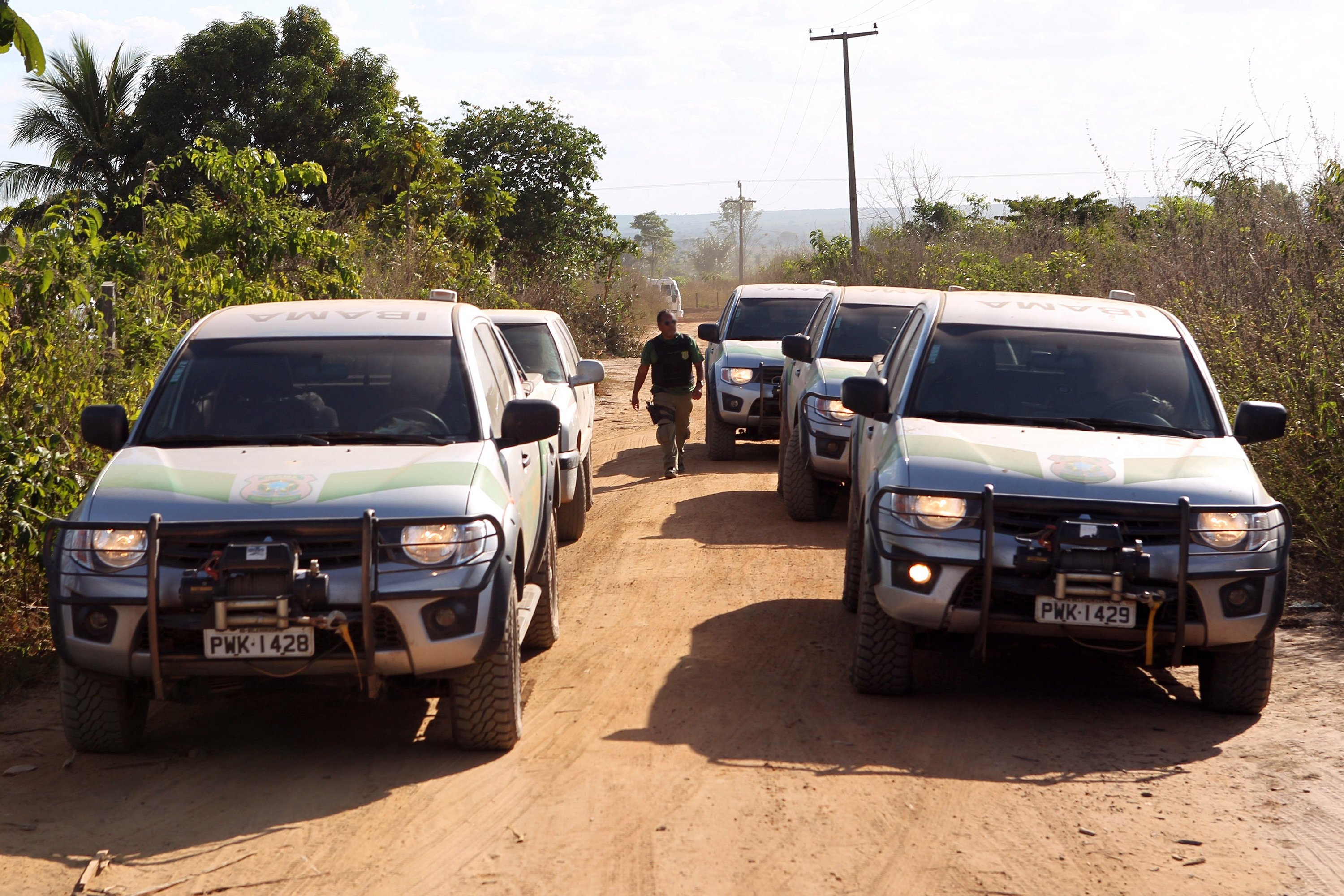 Ibama e Polícia Federal combatem grupo criminoso responsável por extrair e comercializar ilegalmente madeira da Reserva Biológica do Gurupi e das Terras Indígenas Caru e Alto Turiaçu, no Maranhão. Foto: Felipe Werneck - Ascom/Ibama